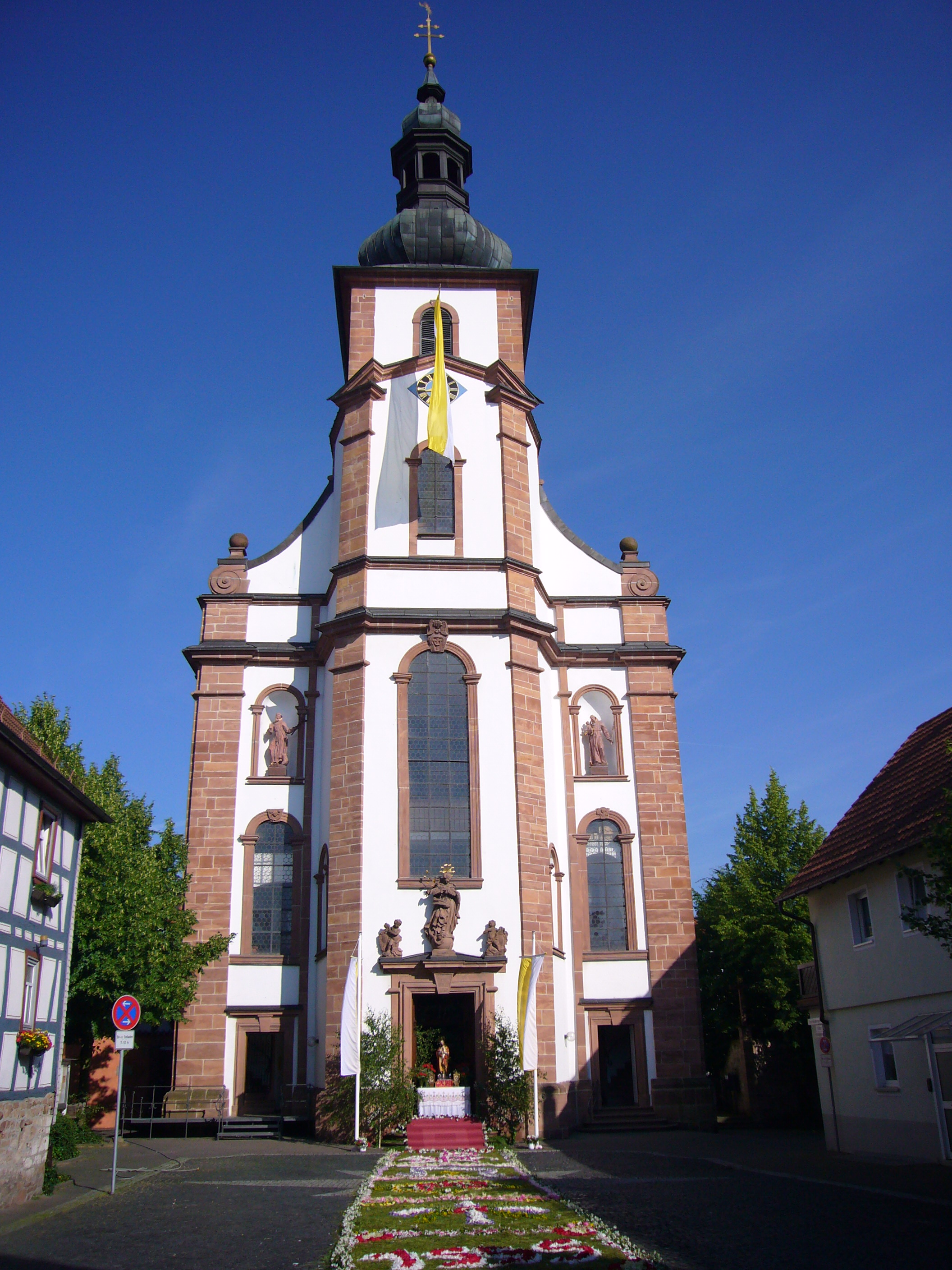 Pfarrkirche St. Peter und Paul (erbaut 1737-45)